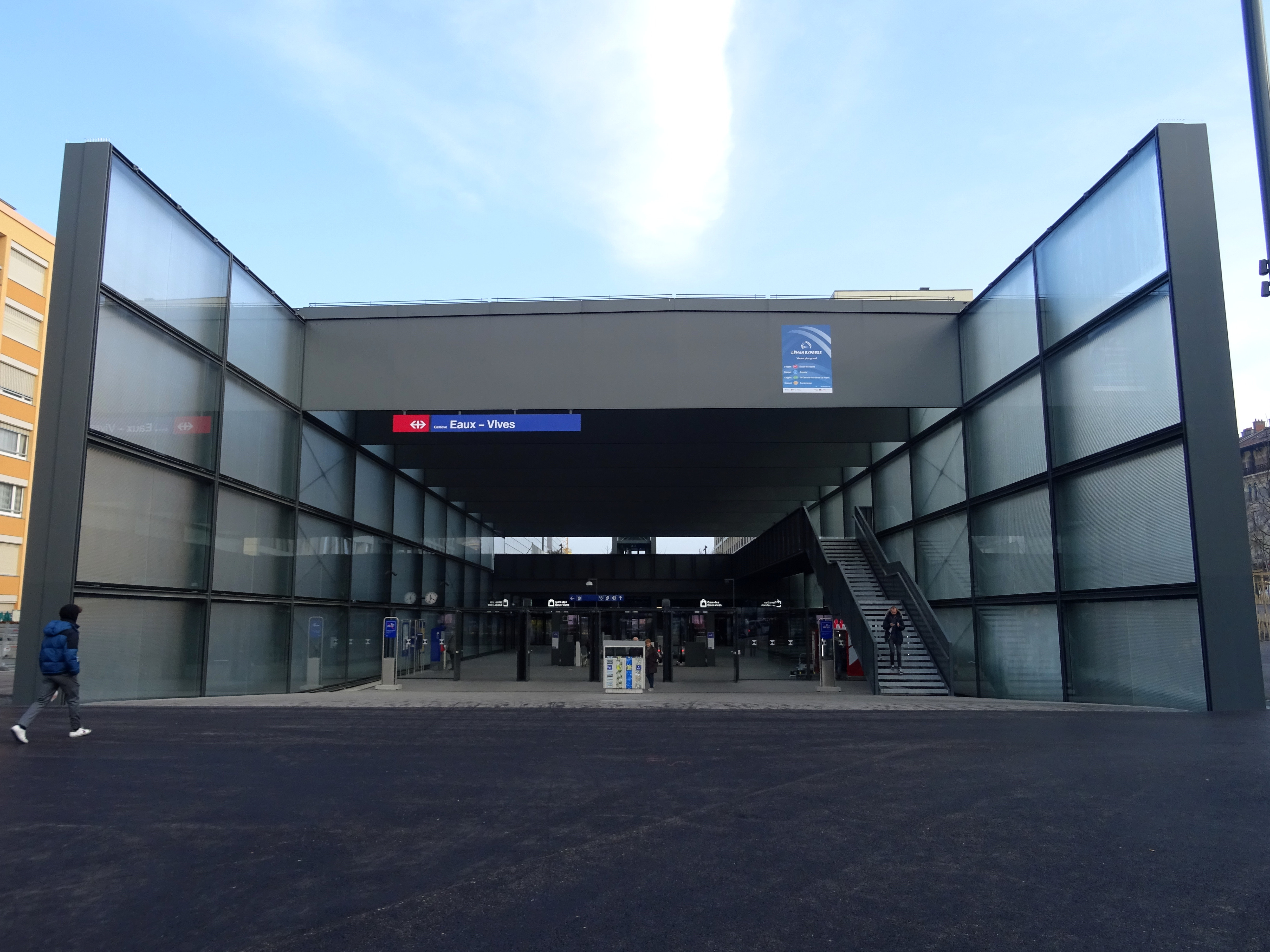 Entrée principale de la gare de Genève-Eaux-Vives.